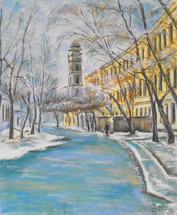 Гродно, улица Замковая, 1966 год. Справа - бывшие дома еврейских промышленников и торговцев. Написано в 1966 году. Пастель. ДВП. Художник - Анатолий Наливаев.